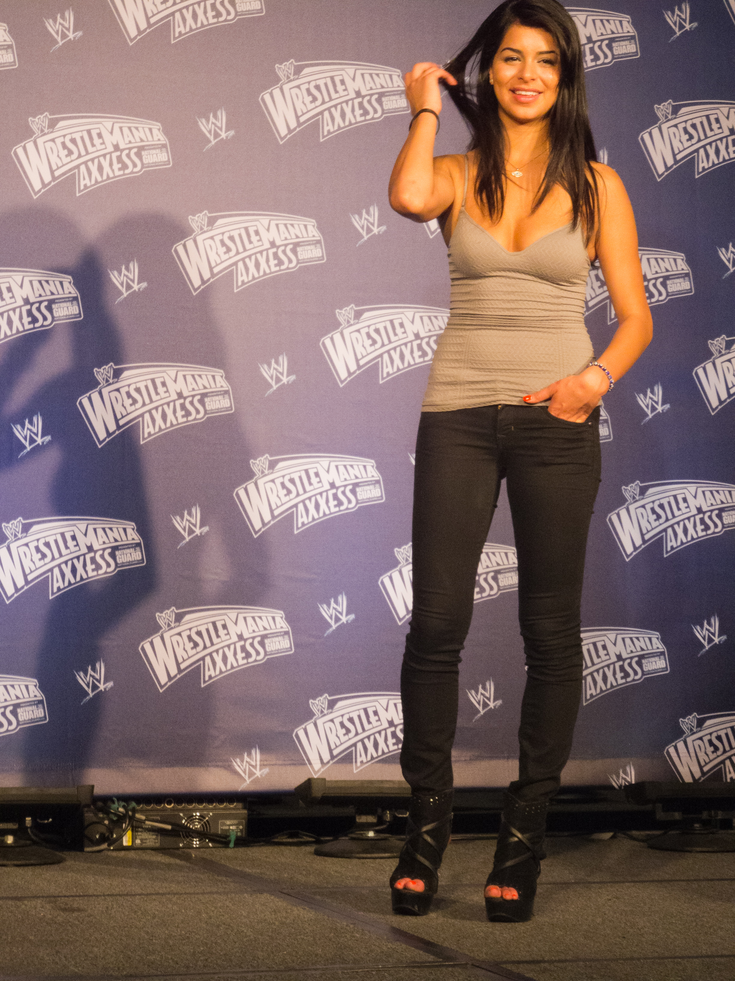 WWE Fan Axxess - Rima Fakih